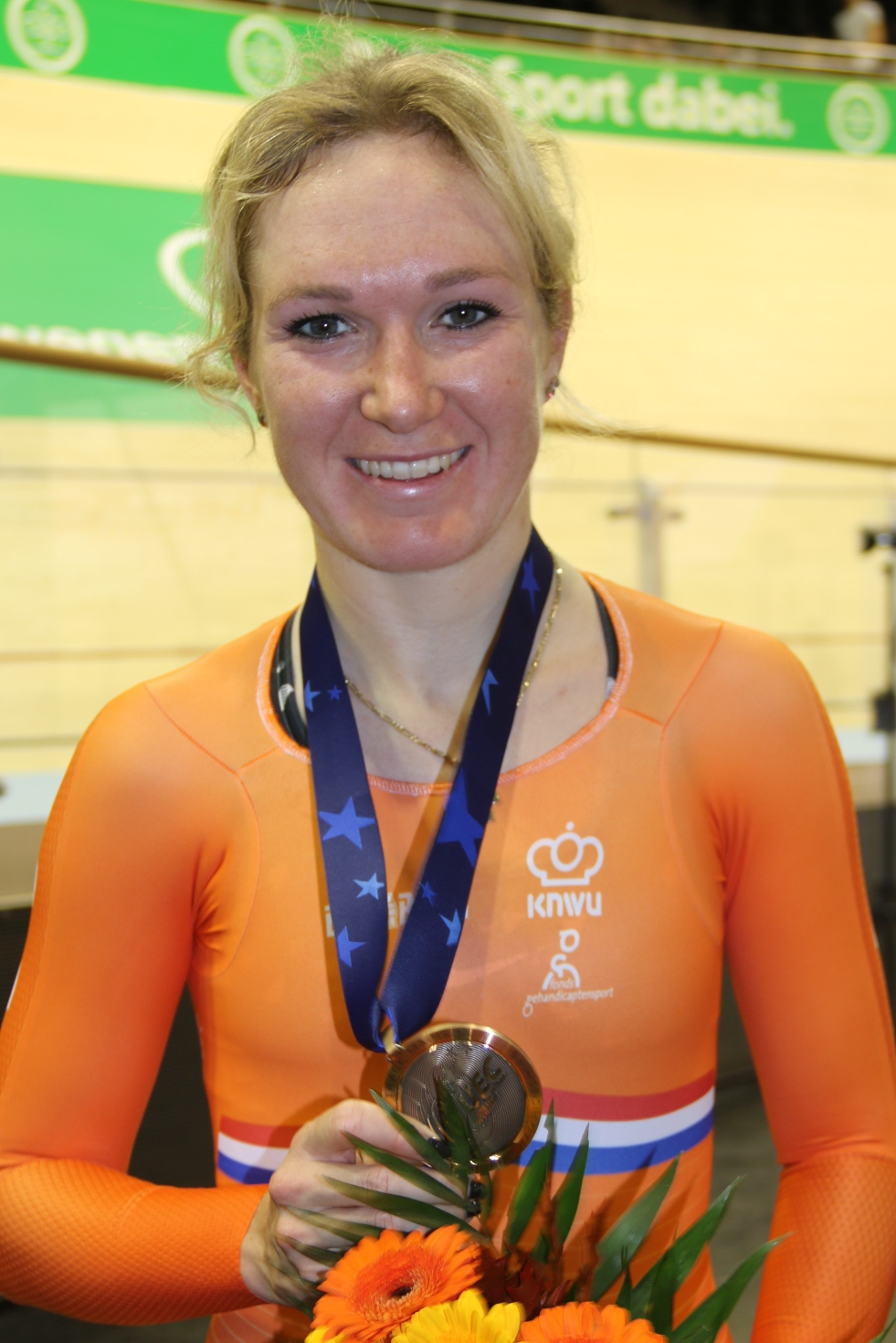 Amy Pieters, niederländische Radsportlerin, Bronze im Zweier-Mannschaftsfahren